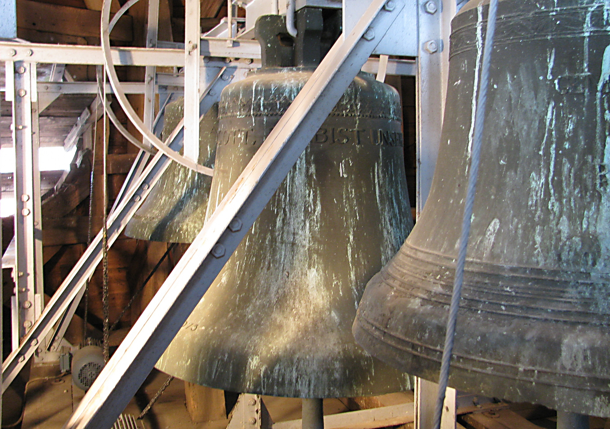 Glocken der Evangelischen Kirche in Holzheim, Pohlheim, Hessen